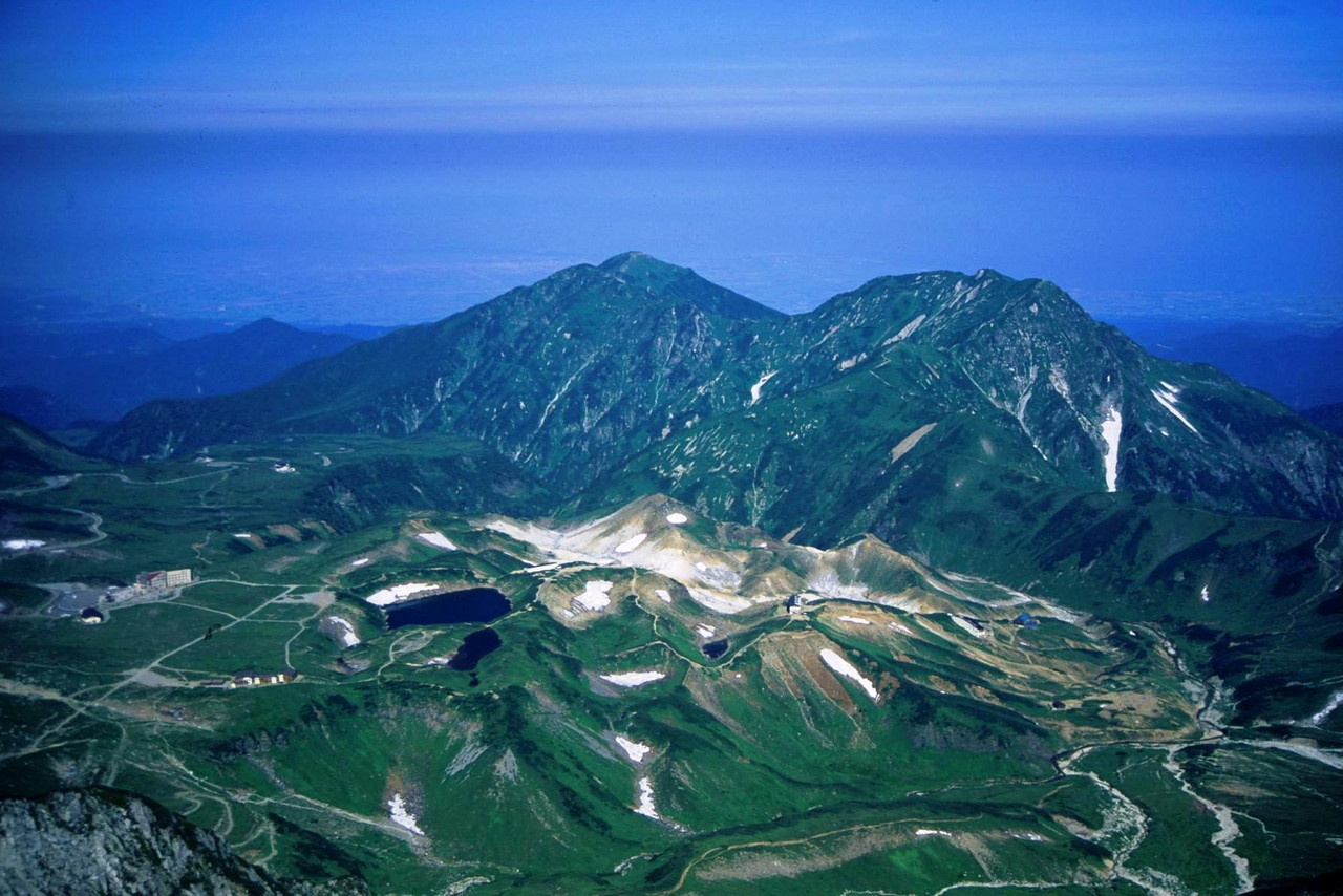 Dainichirenpo and Murodo seen from Mount Tate